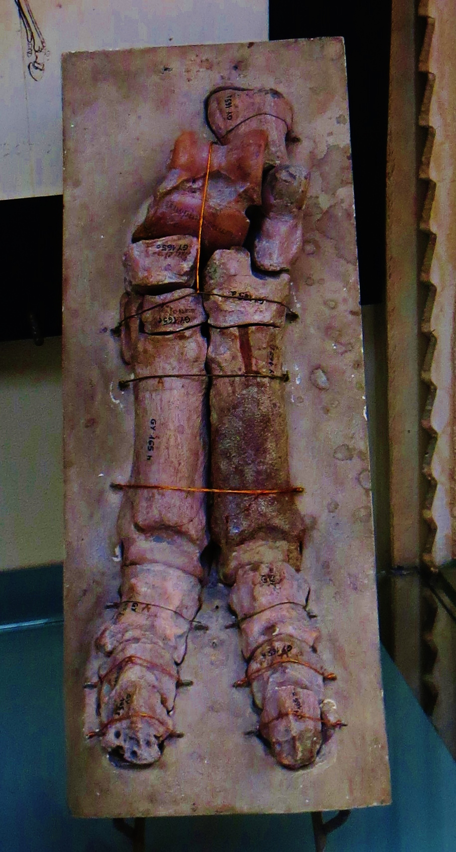 Fossil of Anoplotherium, an extinct mammal - Took the photo at Museum Histoire Naturelle, Paris